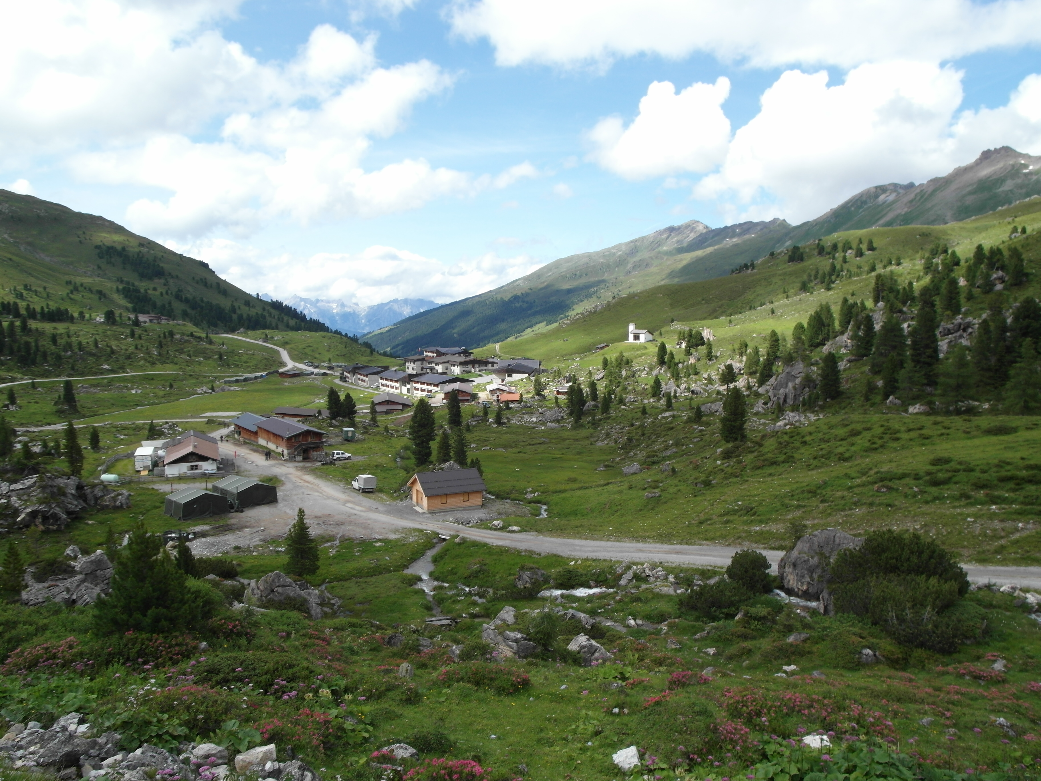 Das Hochlager Lizum des österreichischen Bundesheeres